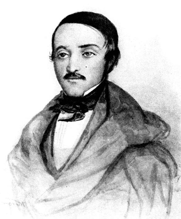 Ігнацій Дамейка, акварэльны партрэт Ю.Куроўскага